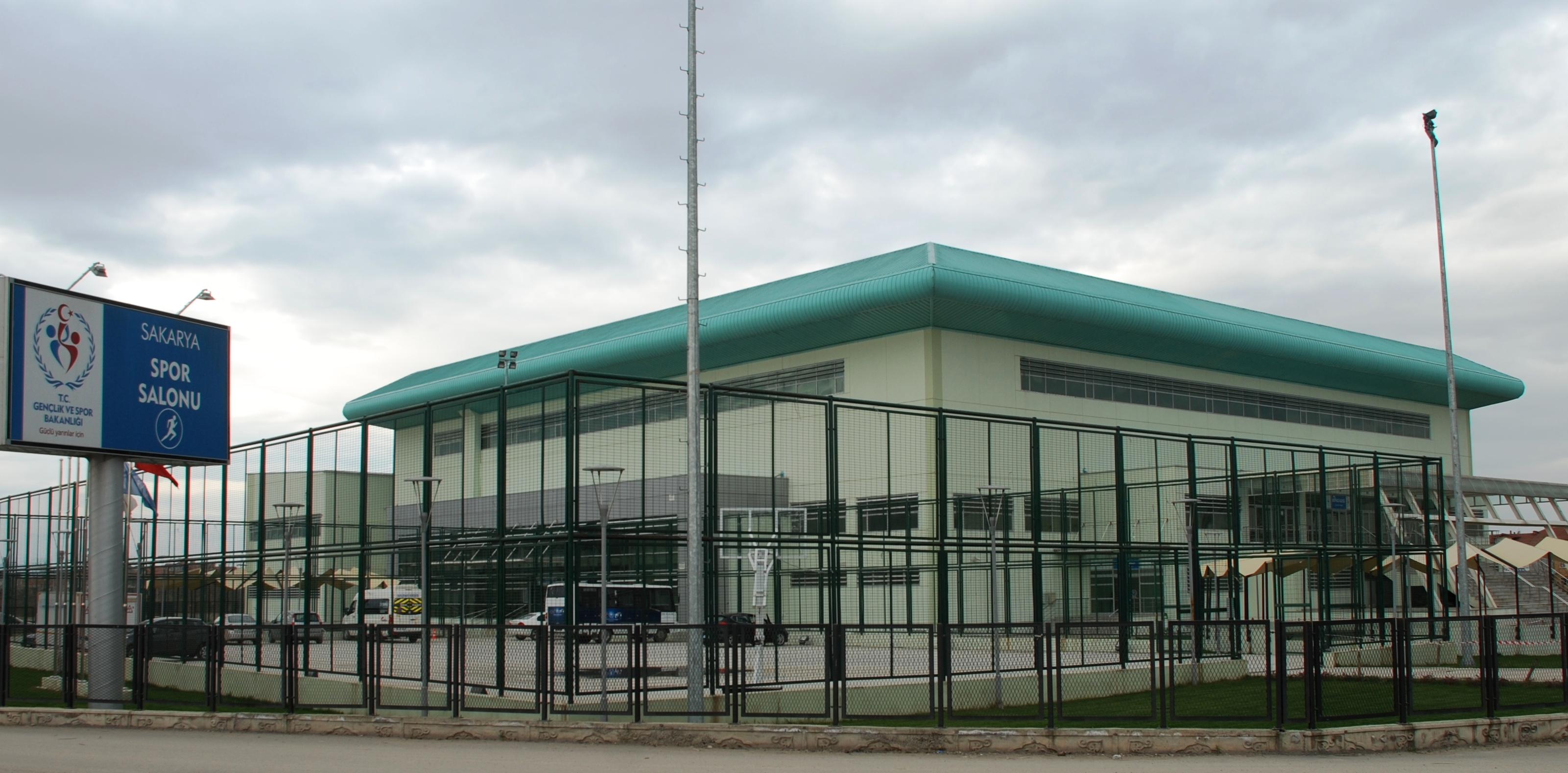 SAKARYA SPOR SALONU